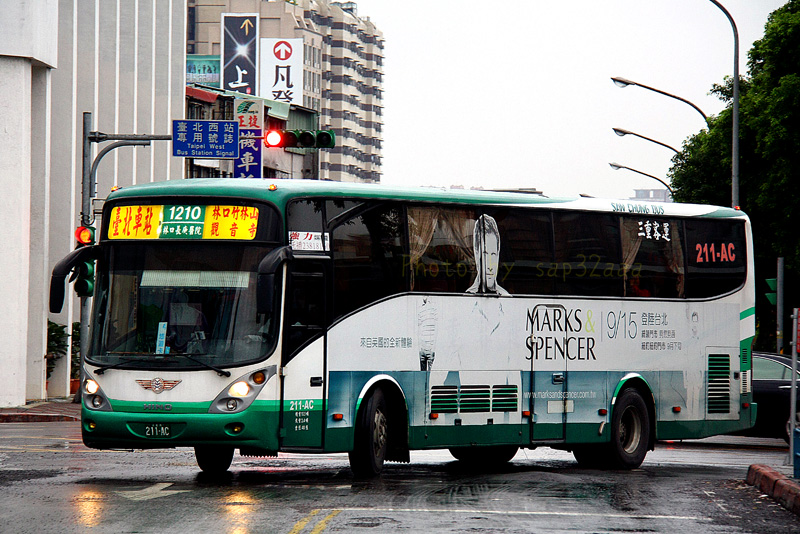 三重客運2004年日野LRM2PSA大客車211-AC，行駛1210線。